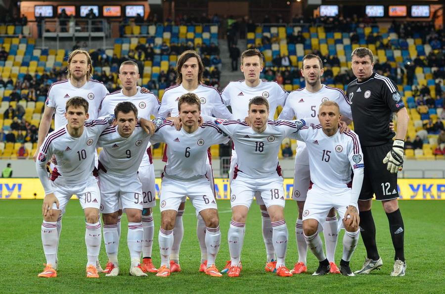 Ukraine - Latvia 2015